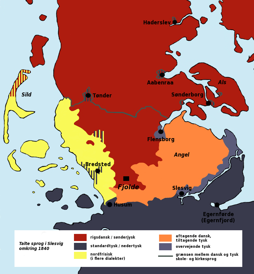 Belliggendhed af landsbyen Fjolde, baserer på kort over sprogskiftet i Sydslesvig